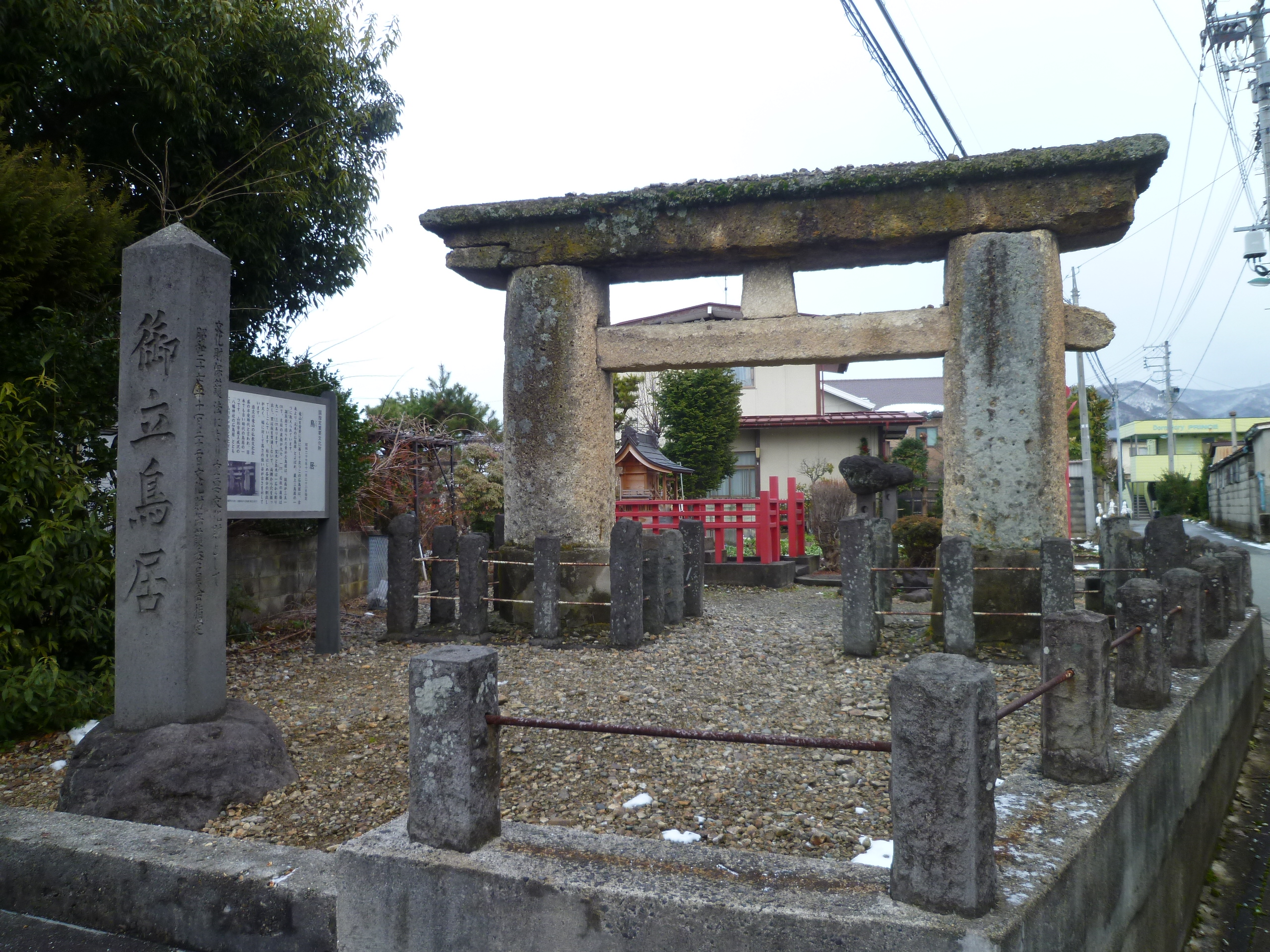 元木の石鳥居。 山形県山形市鳥居ケ丘に所在。 国指定重要文化財。